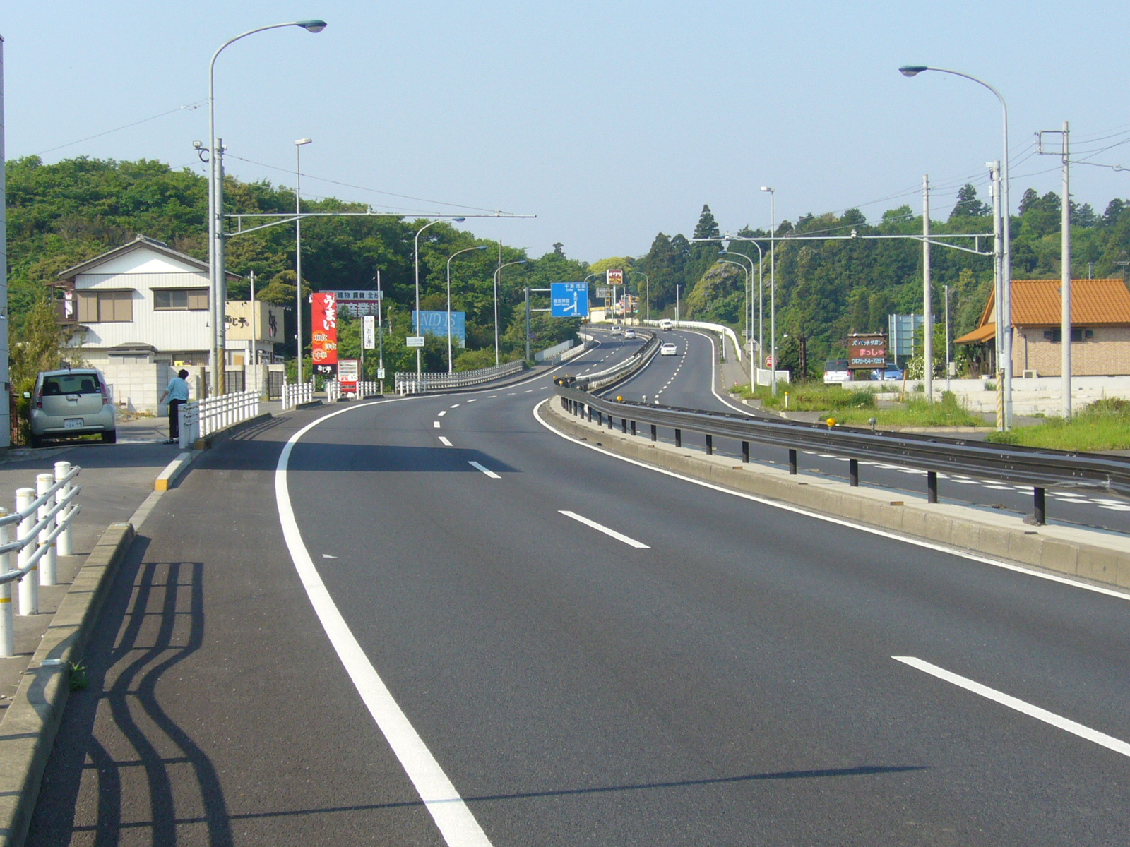 route-51,tamatsukuri-katori-city,japan.JPG